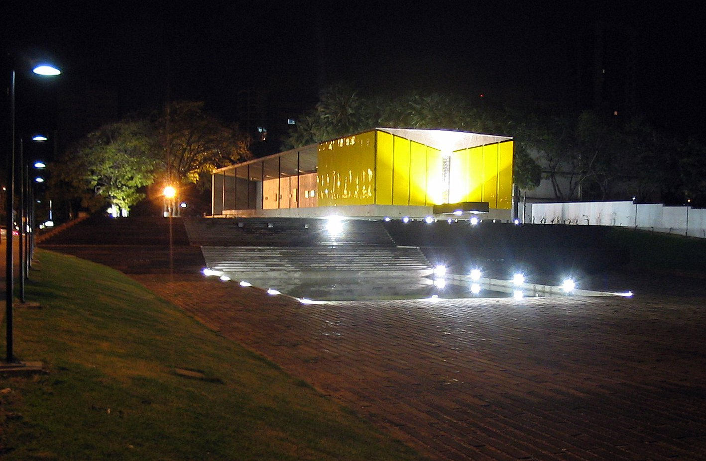 Mausoleo do presidente Castelo Branco na cidade de Fortaleza iluminado a noite